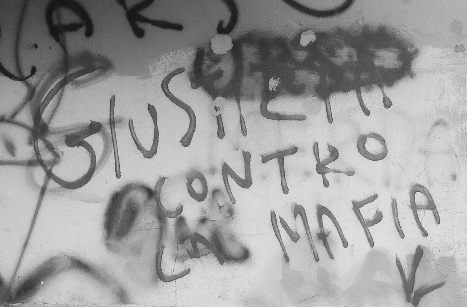 Giustizia contro la mafia (graffito a Siracusa)